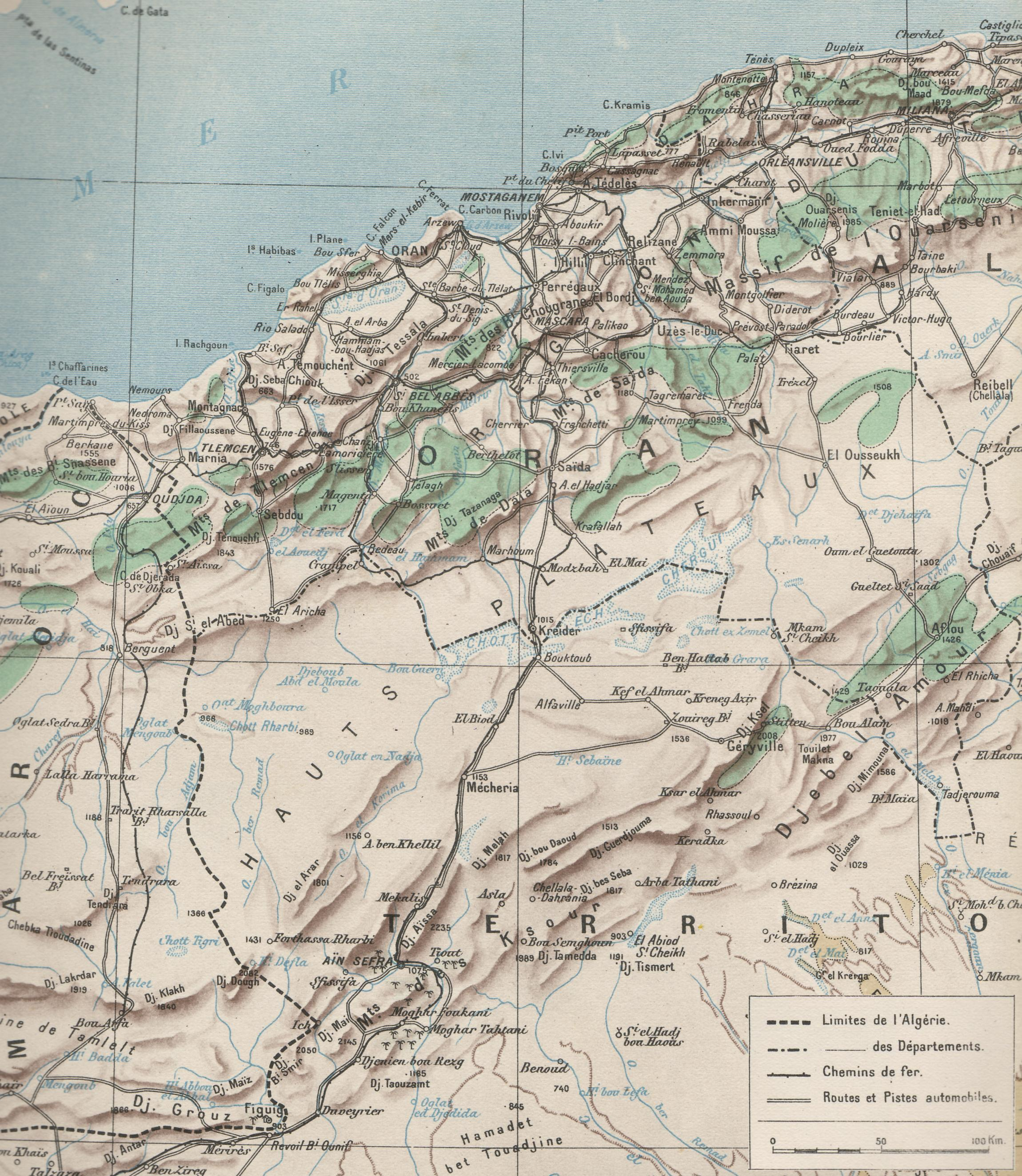 Carte du département d'Oran et des hauts-plateaux du sud Oranais. L'illustration du 24 mai 1930.